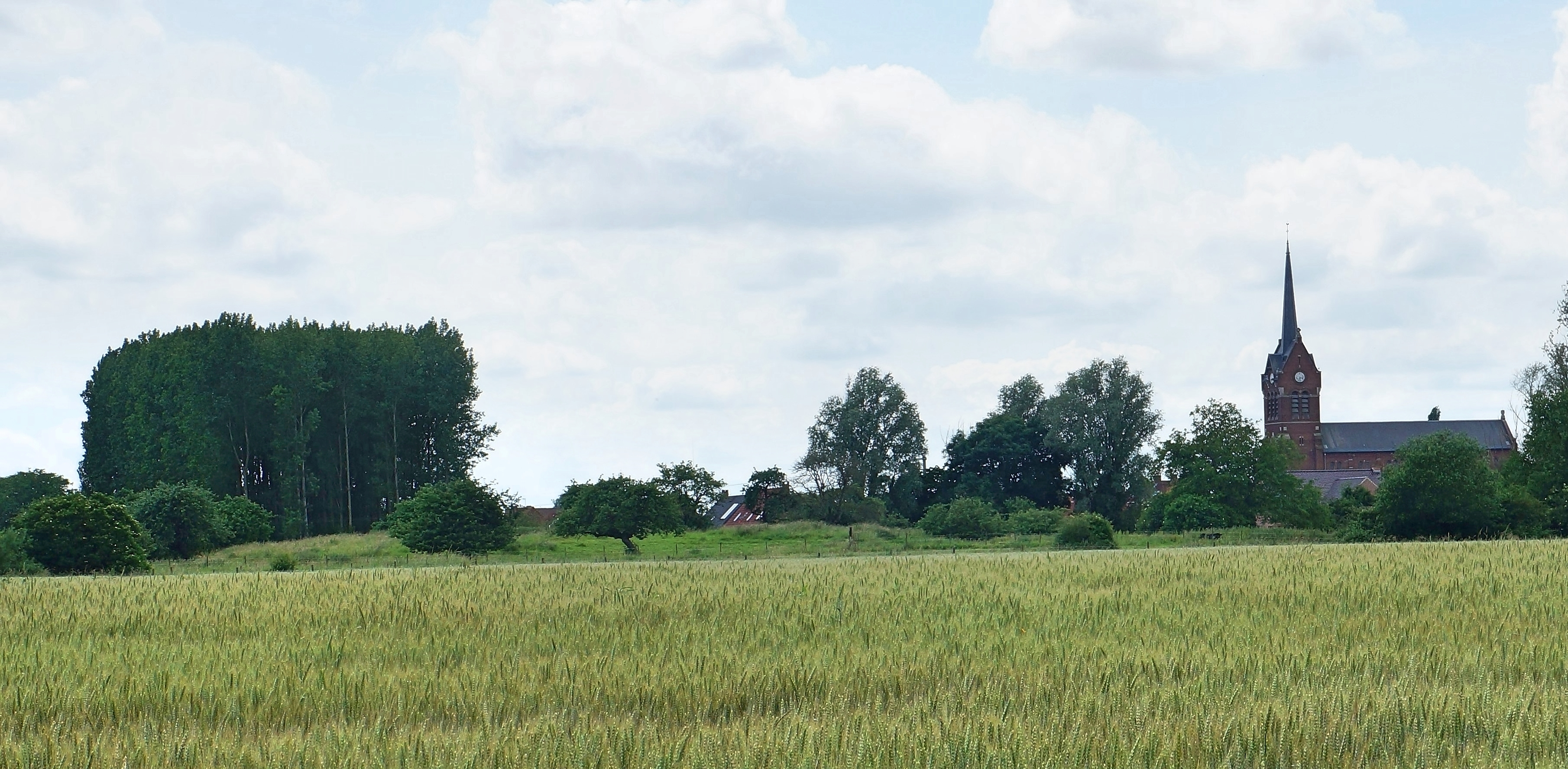 La Motte féodale Village de Le Doulieu Nord Hauts-de-France vue de la Rue du Bitram.- Steenwerck. .